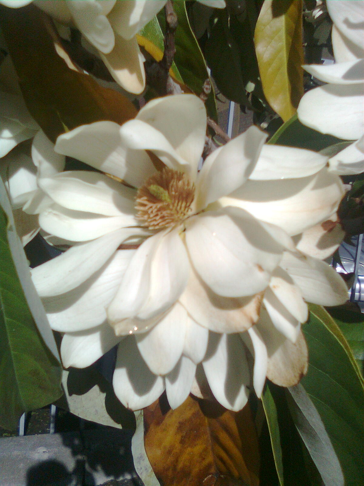 अनंत वृक्षाचे फुल.